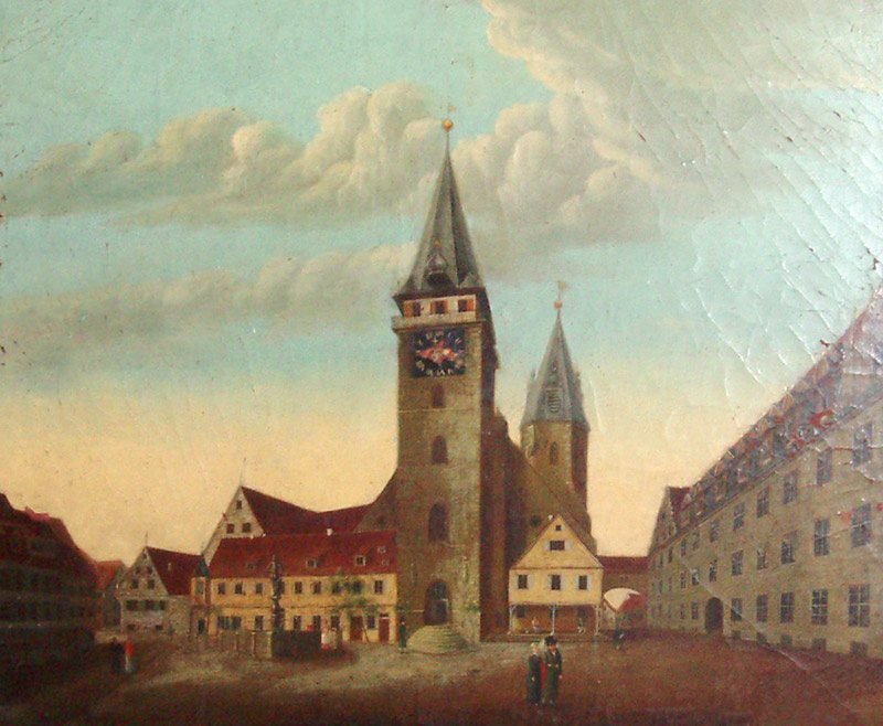 Stiftskirche in Öhringen 1823, zeitgenössisches Gemälde im Blasturm (Fehlstellen im Originalbild, insbesondere im Himmel digital ergänzt, Farben digital etwas aufgehellt)